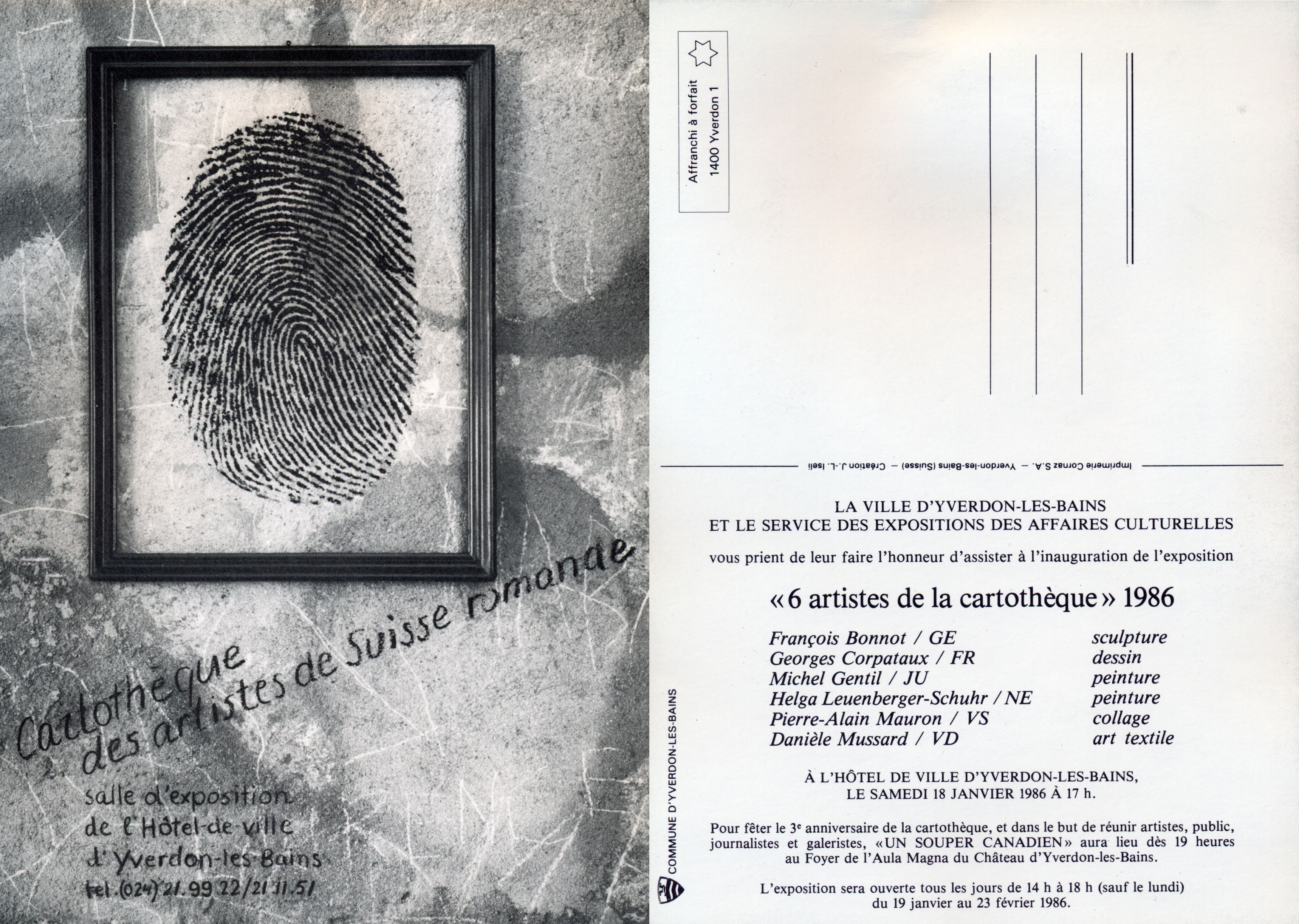 Flyer recto-verso pour l'exposition "Cartothèque des artistes de Suisse romande". 1986 à Yverdon-les-Bains, Salle d'Exposition.